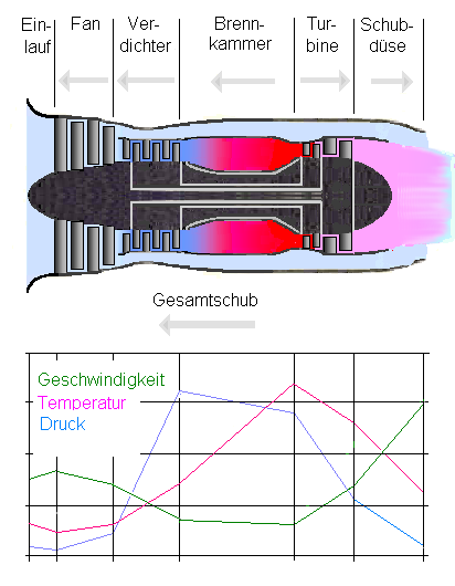 Schubanteile sowie Geschwindigkeits-, Temperatur- und Druckverläufe in einem Strahltriebwerk.